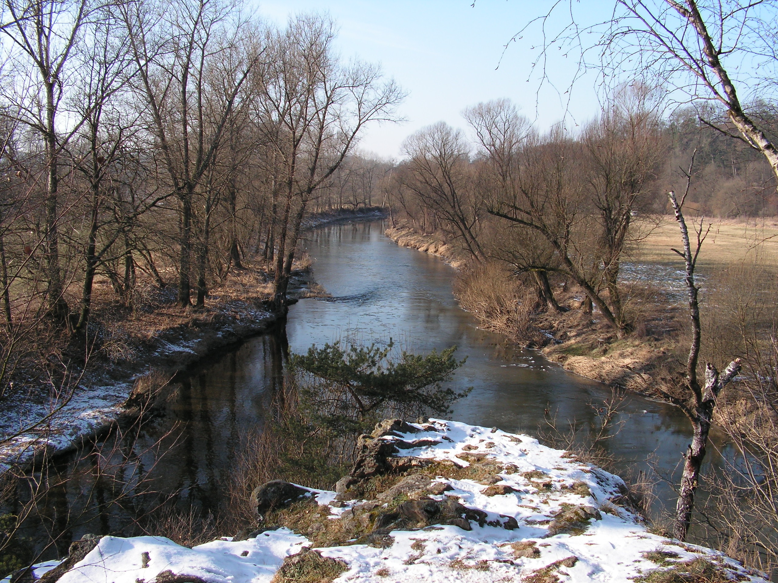 Pohled ze skály na soutok Sázavy a Želivky v únoru 2015. Želivka přitéká zleva.